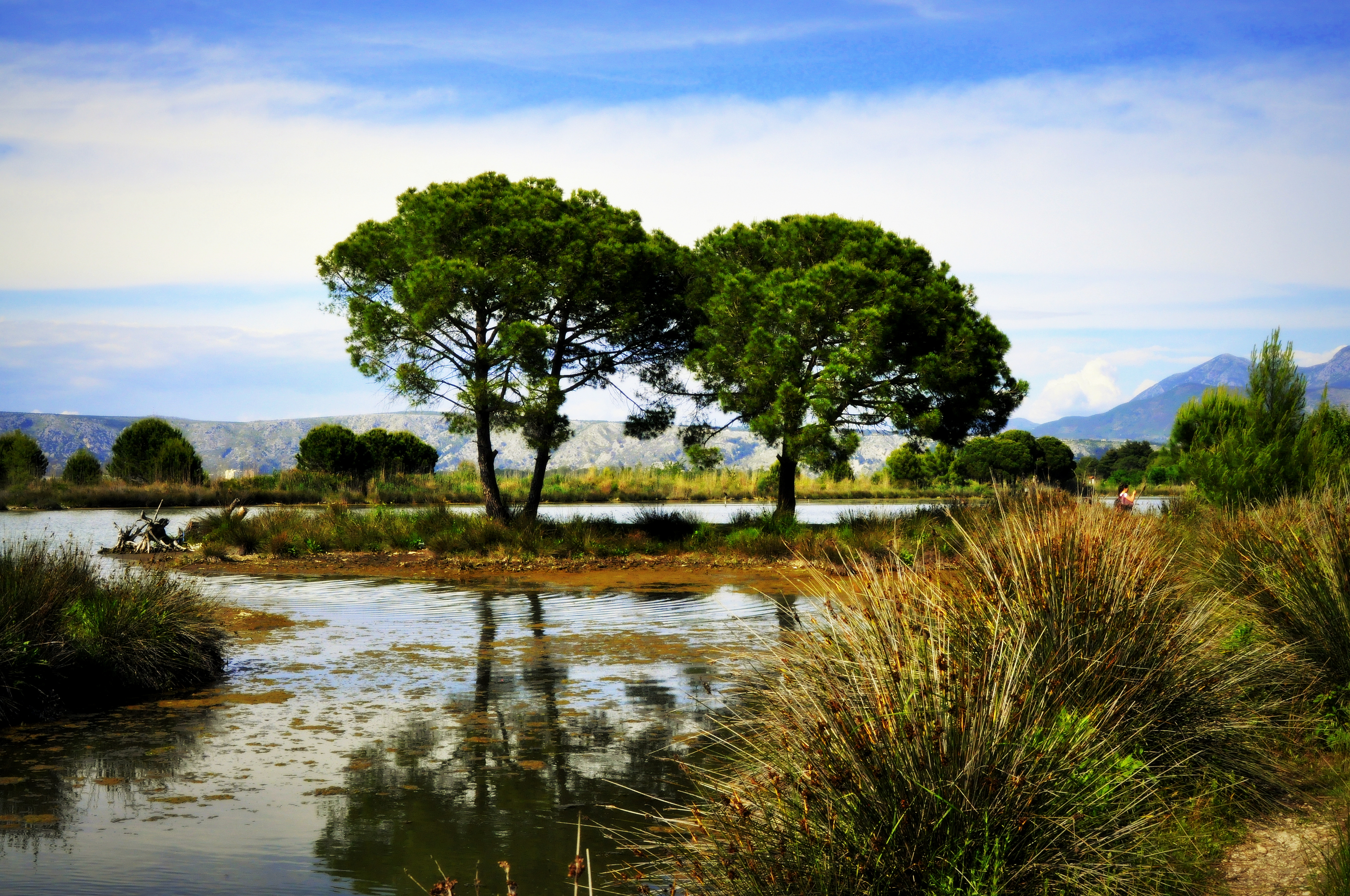 Kune-Vain-Tale, Lezhe